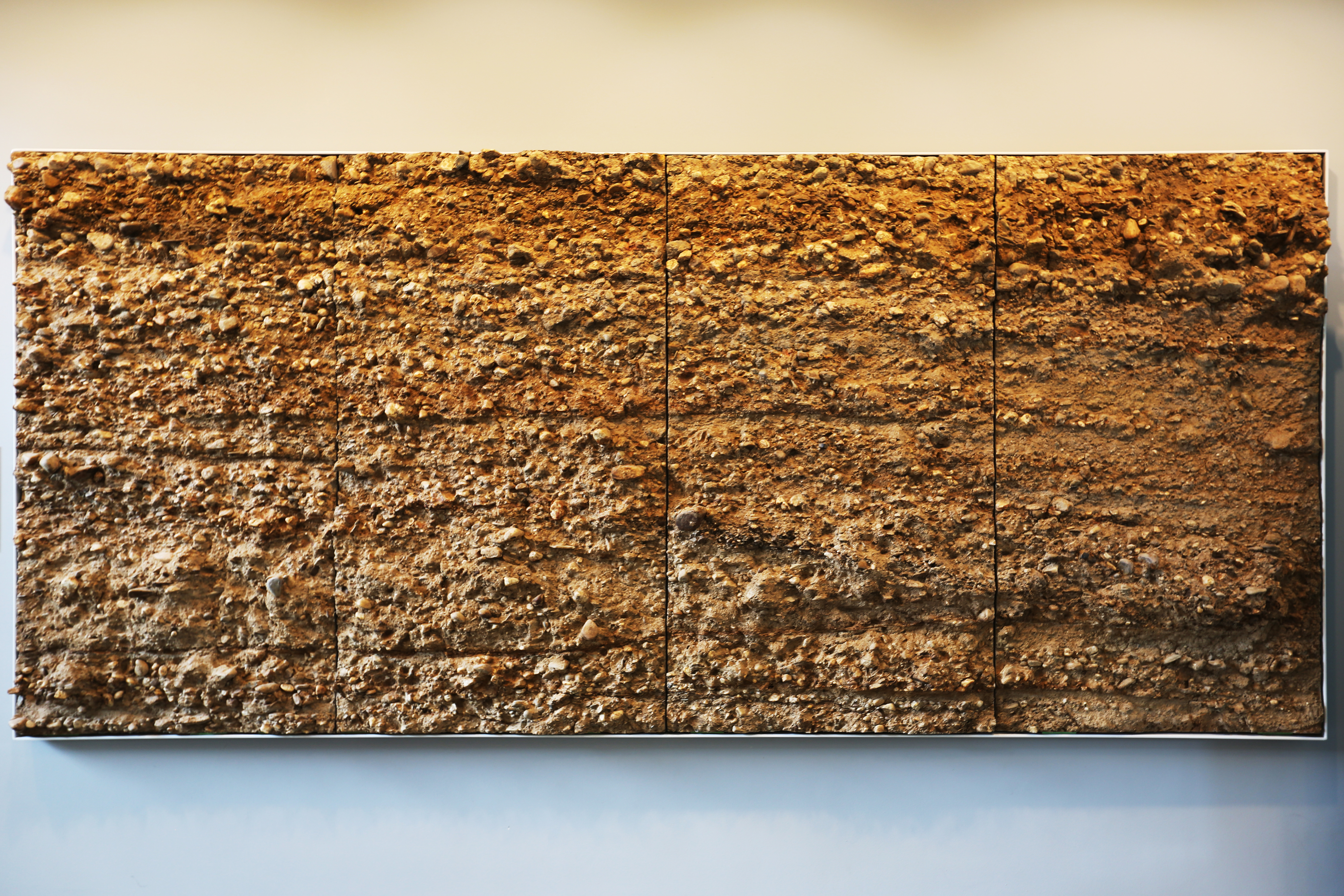 Leihgabe des Römisch-Germanischen Museums, der Stadt Köln. Querschnitt durch den Damm der großen römischen Staatsstraße „via publica“ von Köln nach Boulogne-sur-Mer. Gefunden 2009 in Köln , Apostelnkloster 13-15, auf dem Gelände der heutigen Fritz Thyssen Stiftung